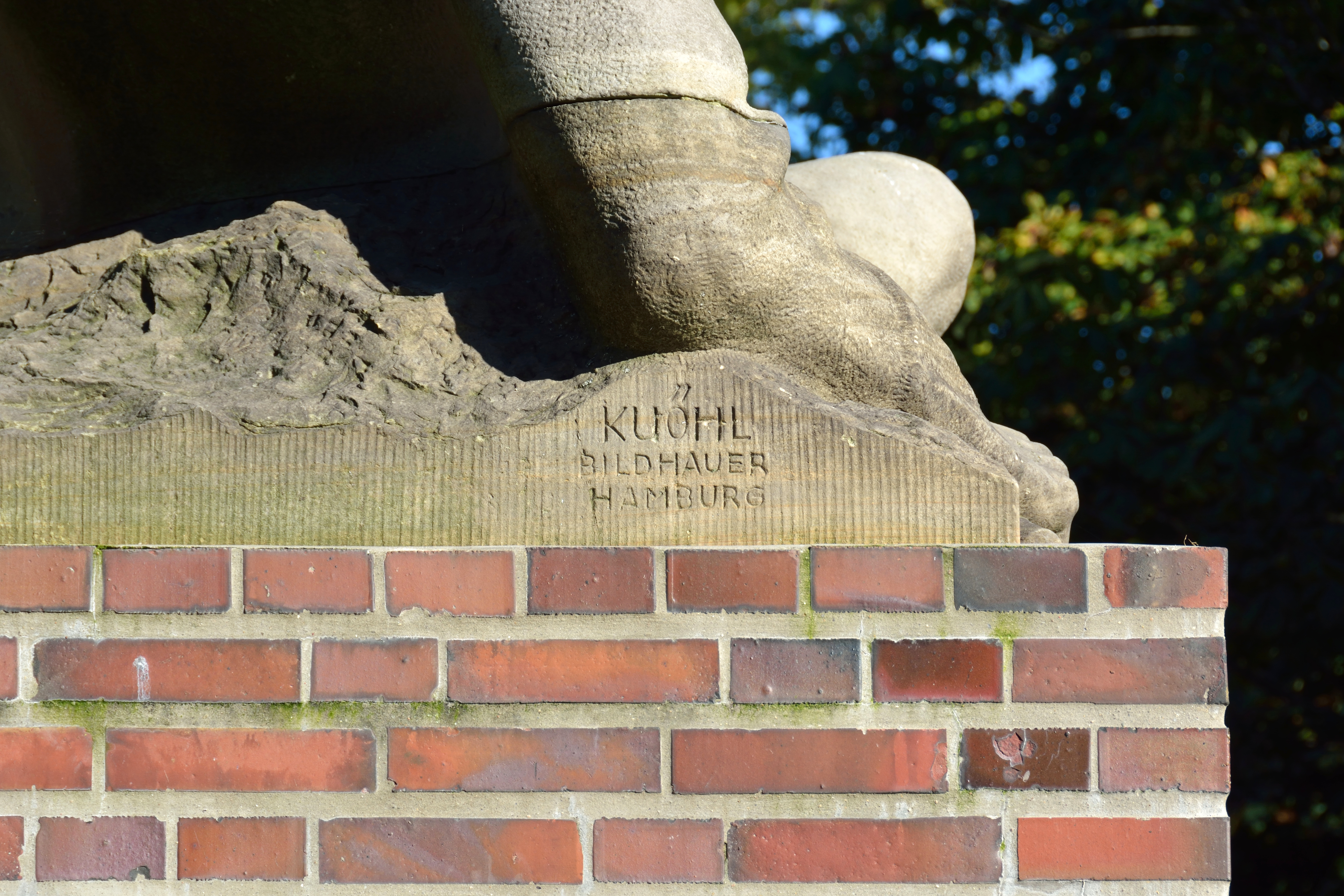 Impressionen aus dem Stadtpark Wilster Ehrenmal